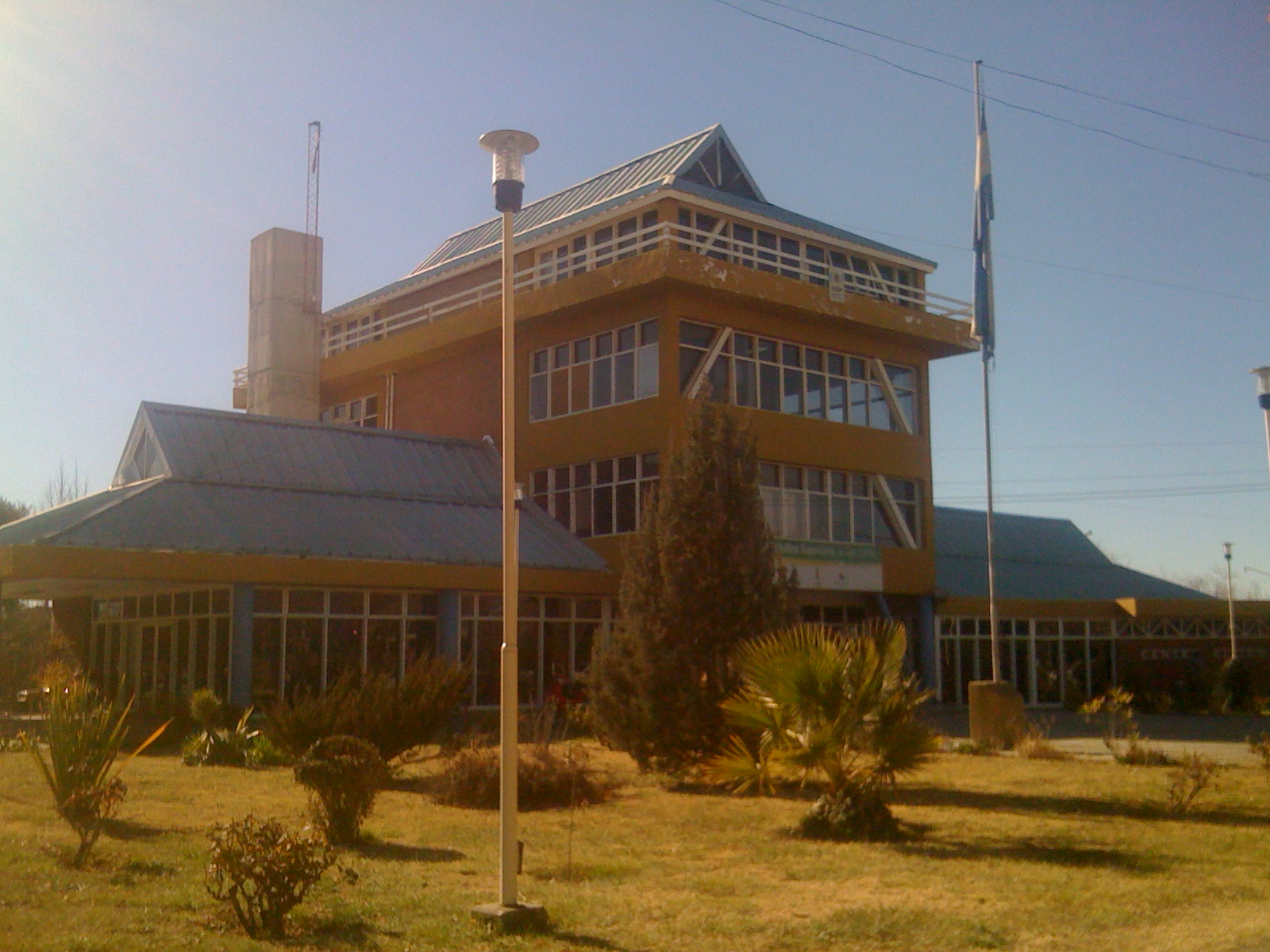 Centro civico de La Consulta, Mendoza